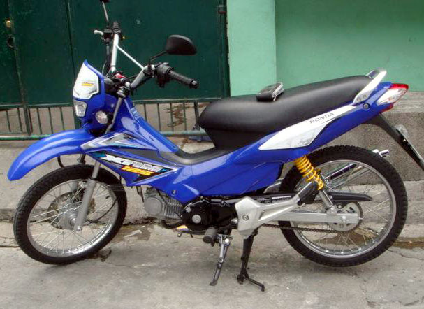 Honda XRM 125